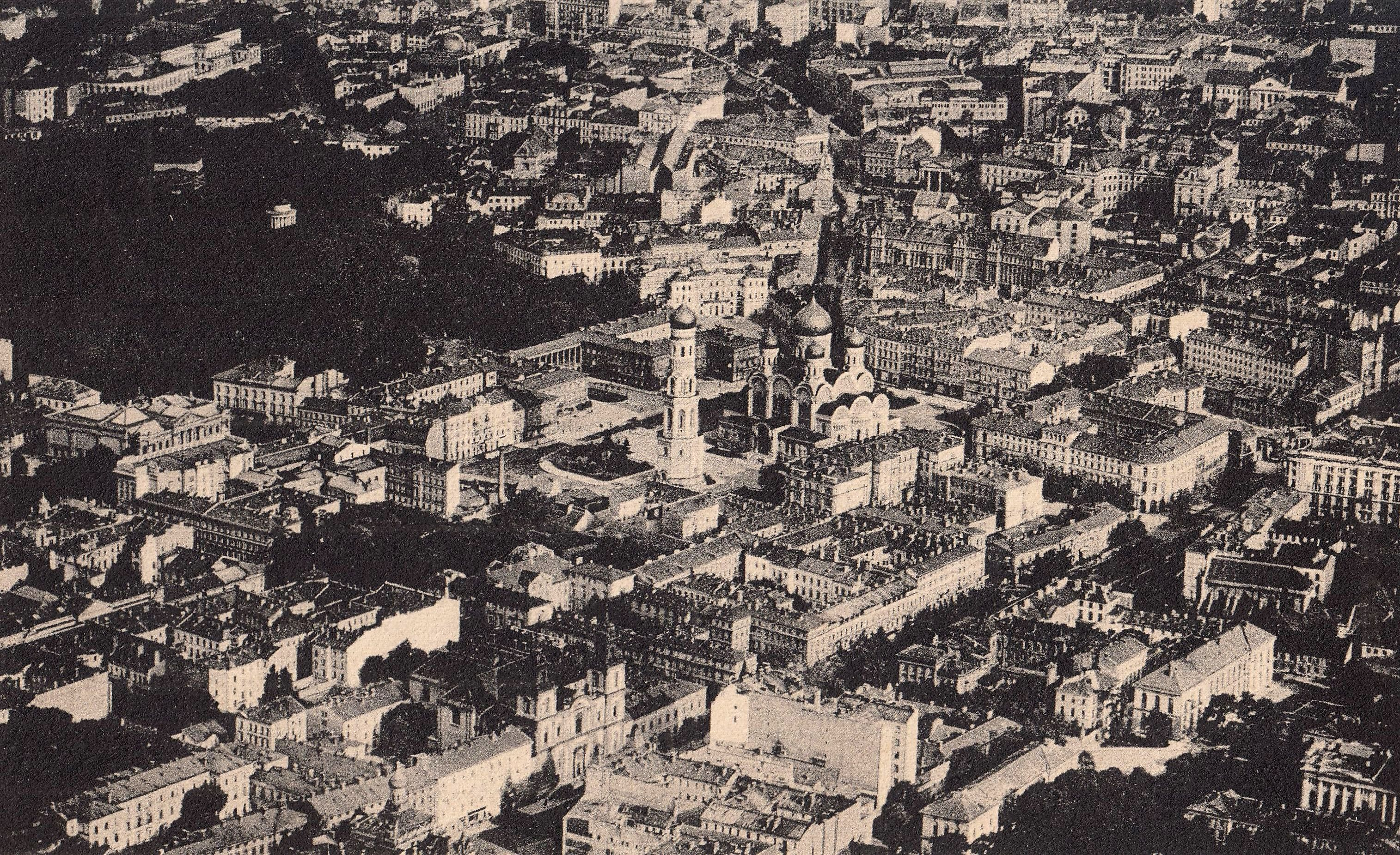 Śródmieście Warszawy z placem Saskim